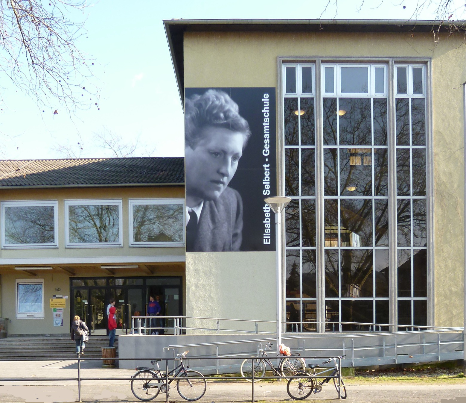 Elisabeth-Selbert-Gesamtschule in Bonn-Bad Godesberg